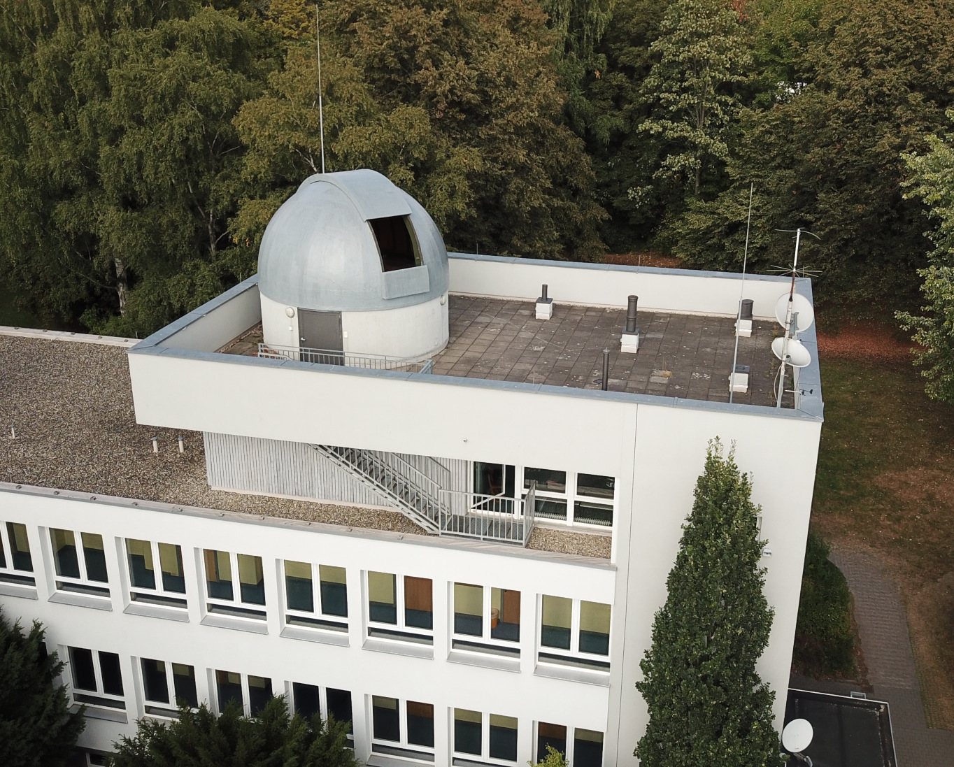 Luftbild der Hans-Nüchter-Sternwarte Fulda